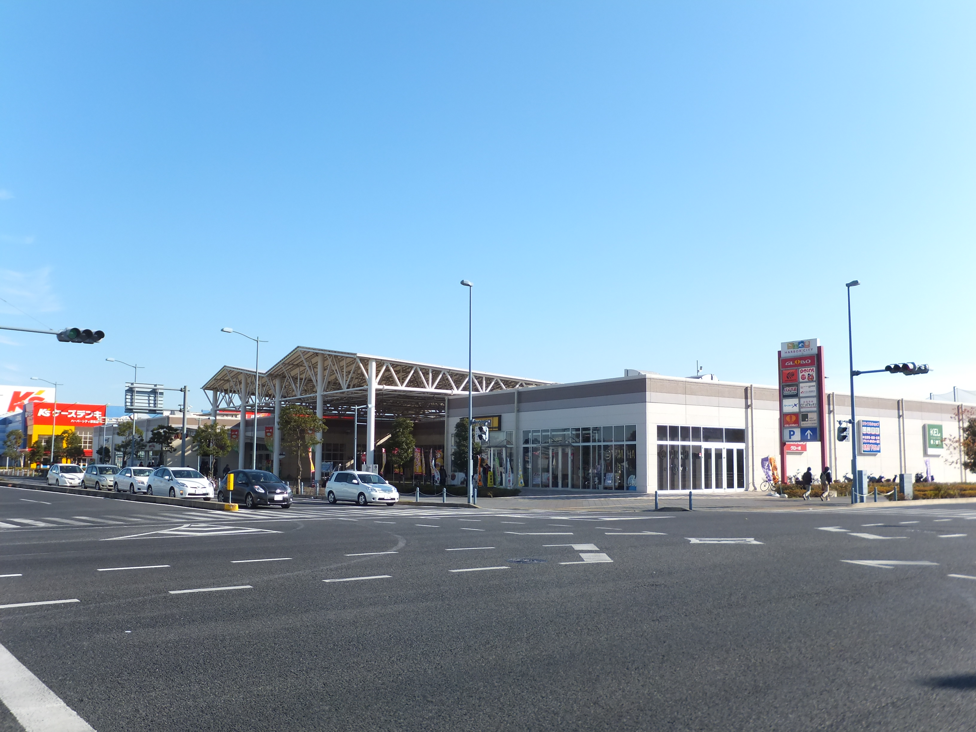 千葉市中央区の蘇我地区にある再開発地区・ショッピングモール、ハーバーシティ蘇我GLOBO（グローボ）蘇我。